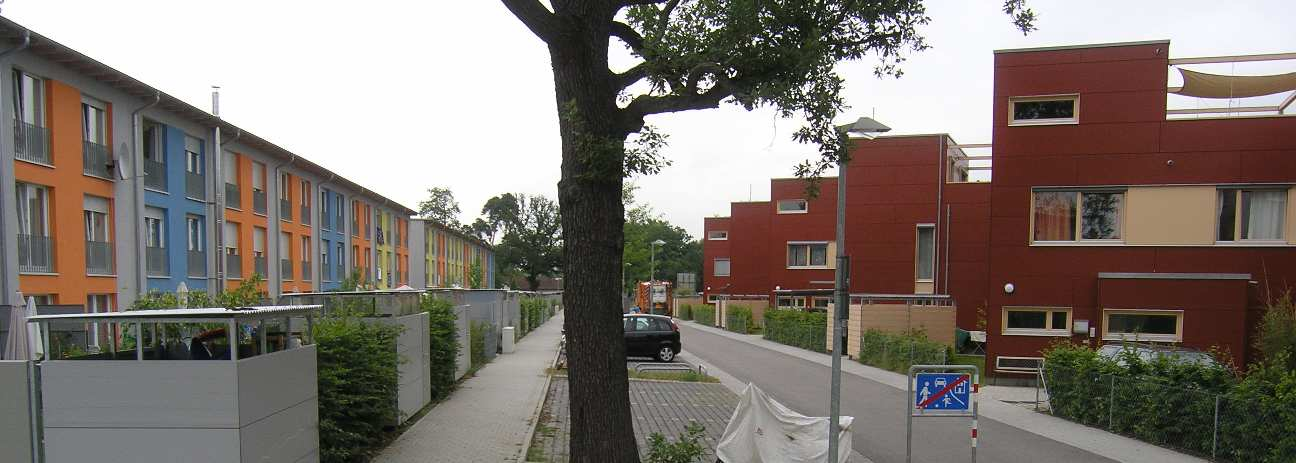 Neubaugebiet Smiley West in der Karlsruher Nordstadt